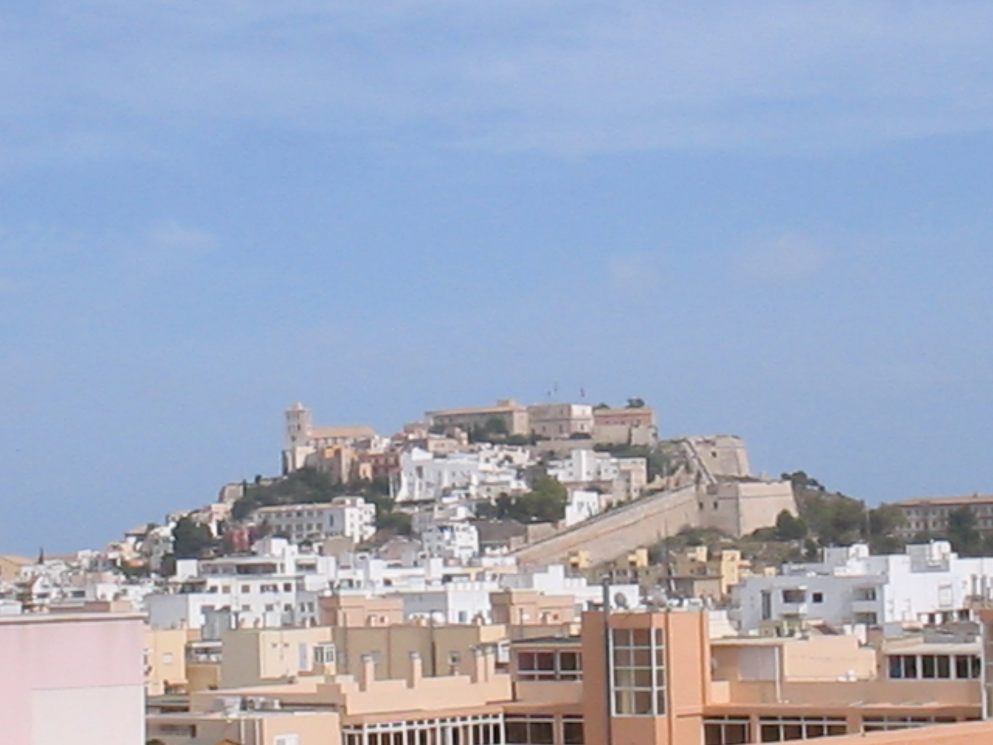 Vista del casco antiguo de Ibiza